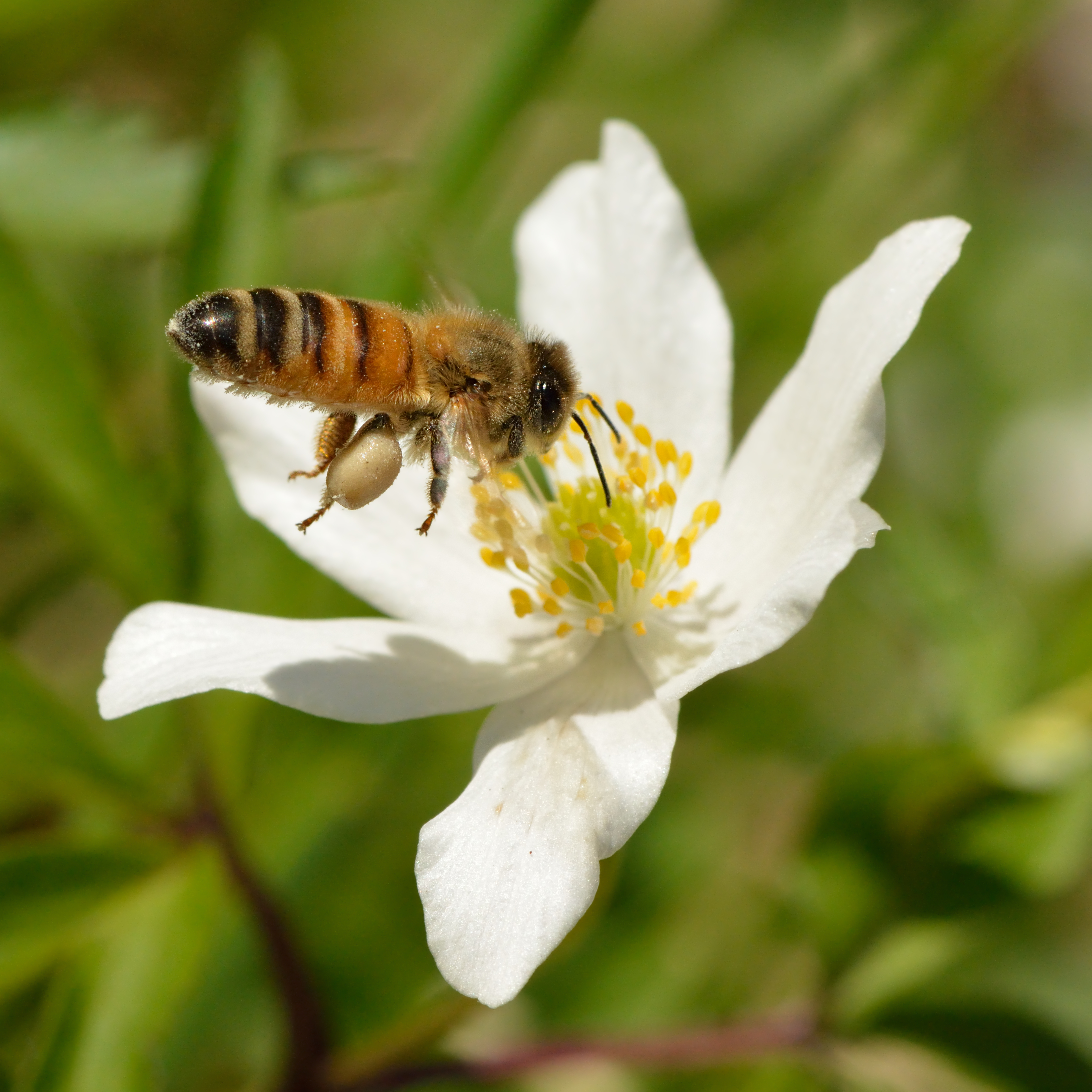 Meemesilane võsaülaselt õietolmu kogumas. Keila, Loode-Eesti.